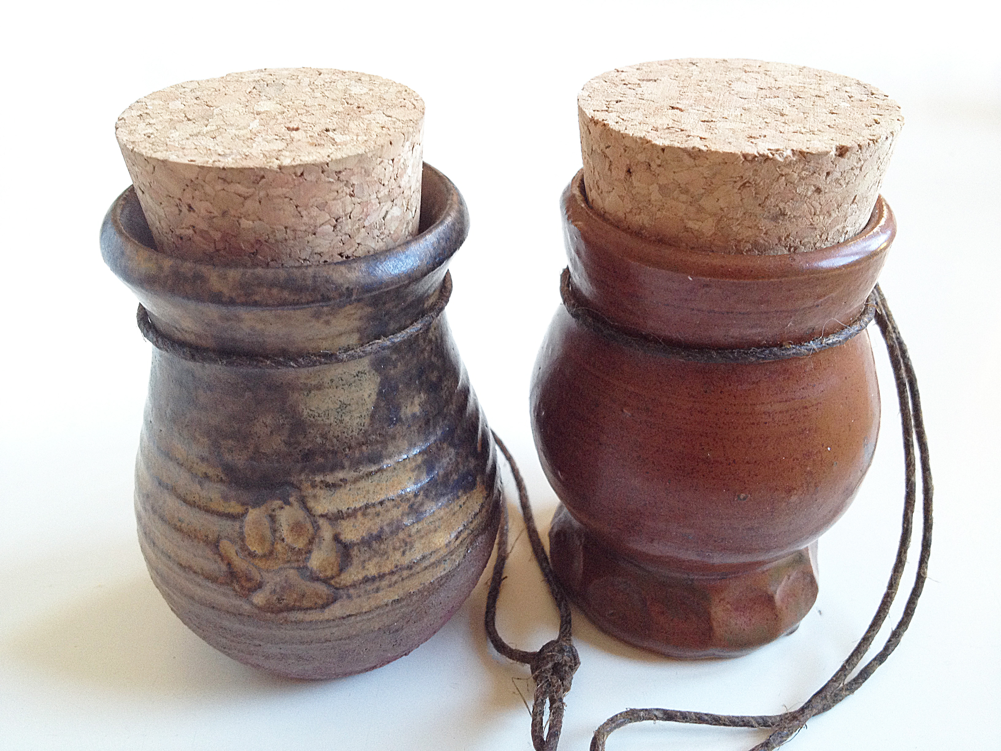 Keramikkärl